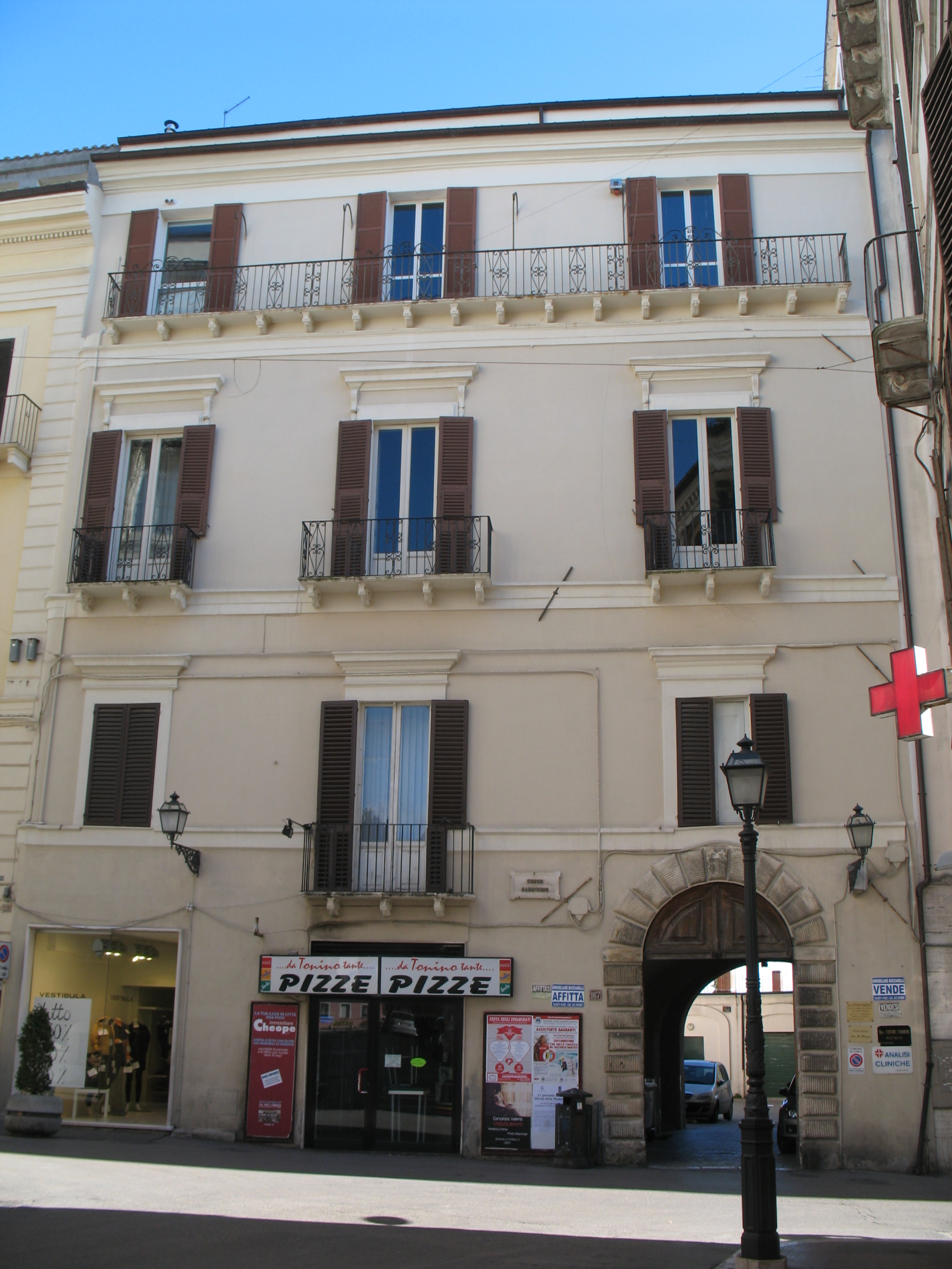 Palazzo Olivieri è un antico palazzo di Chieti posto all'inizio di Corso Marruccino.